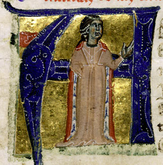 Beatriz de Dia